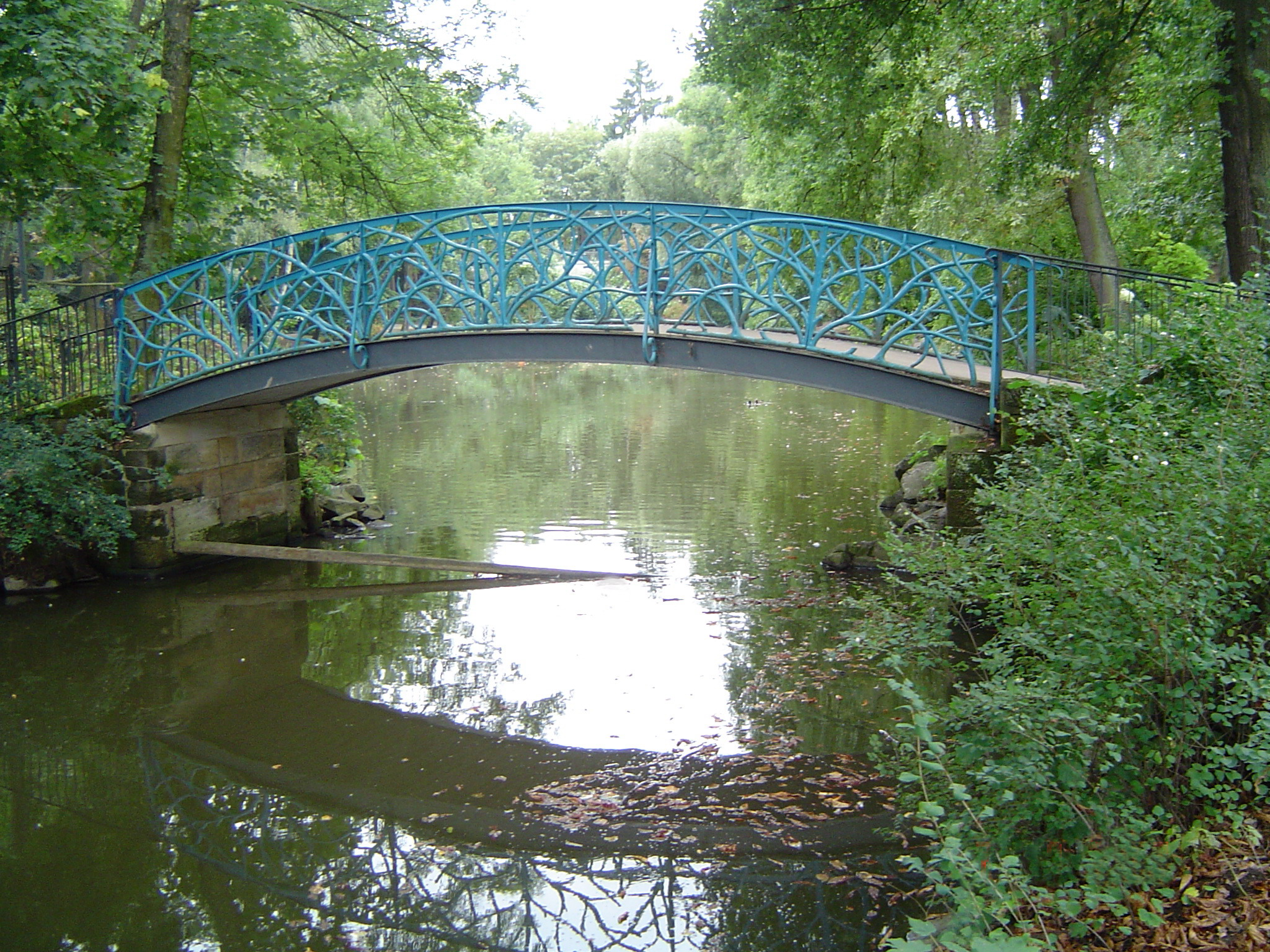 Bayreuth, kleine Brücke zur Röhrensee-Insel, Nähe Pottensteiner Strasse, Denkmal Nr. D-4-62-000-449